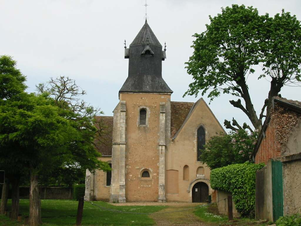 Eglise de Garnay (Eure-et-Loir) Photo JH Mora, mai 2005